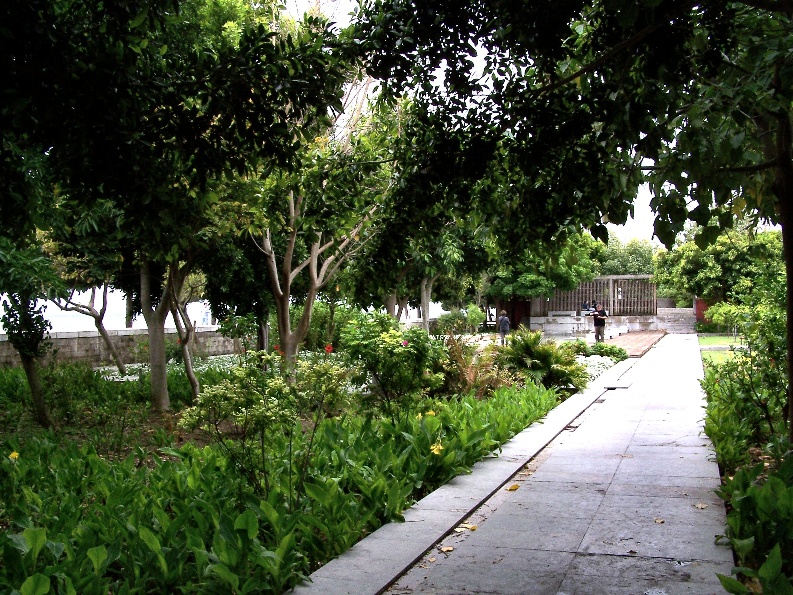 Jardins Tropicais II - do Parque das Nações / Jardins de Lisboa